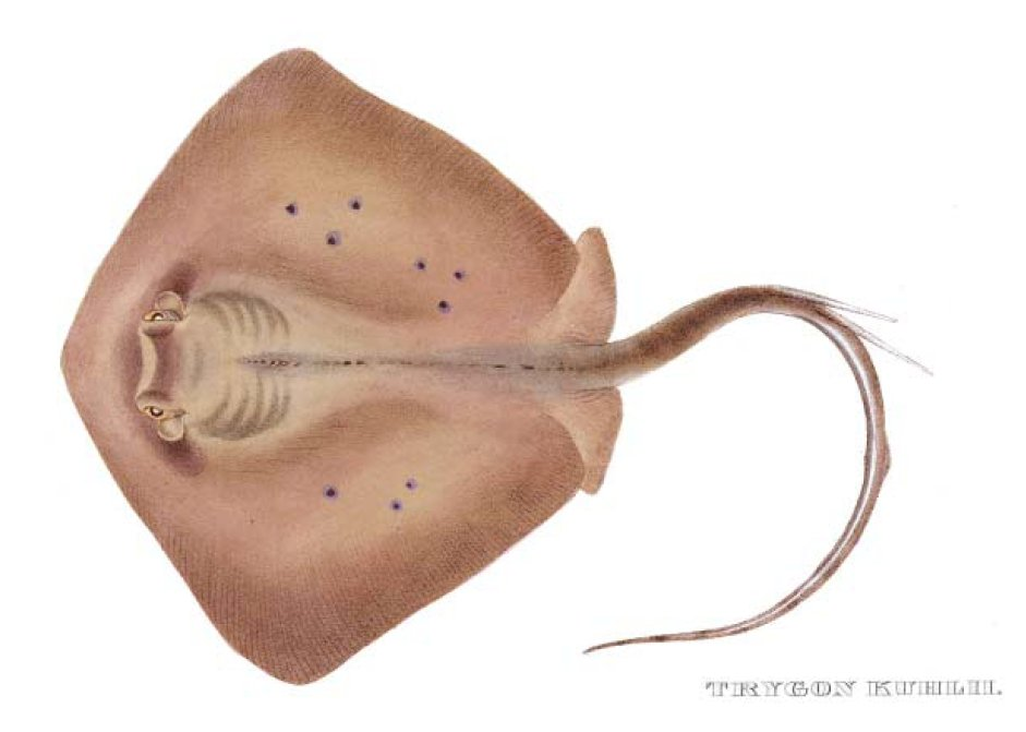 скат рода Neotrygon Neotrygon kuhlii syn. Trygon kuhlii